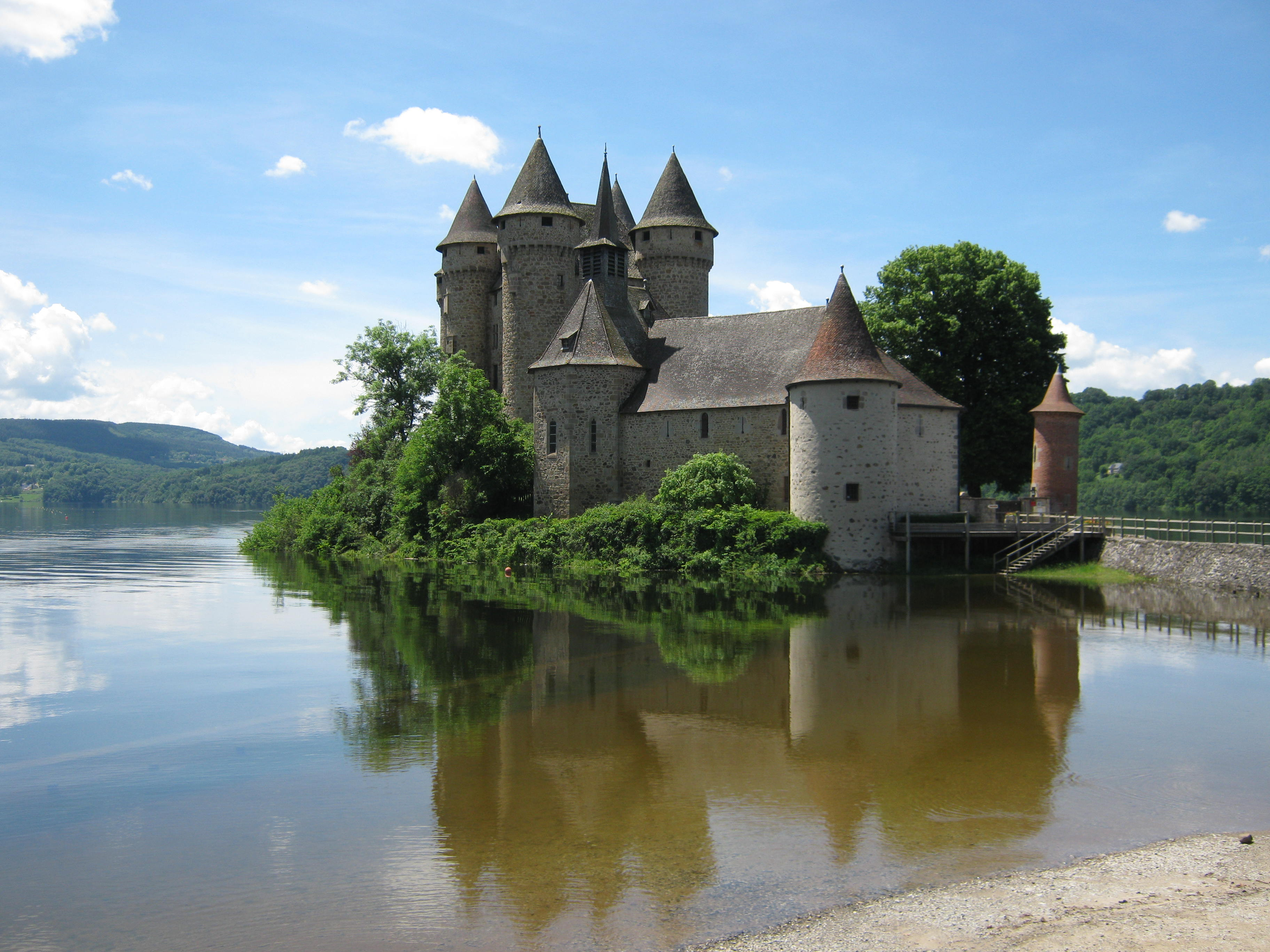 Schloss Val mit Kapelle in der französischen Gemeinde Lanobre (Kantons Champs-sur-Tarentaine-Marchal) der Region Auvergne-Rhône-Alpes. Aufnahme von 2016.